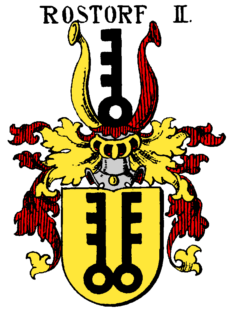 Wappen der Grafen von Barby